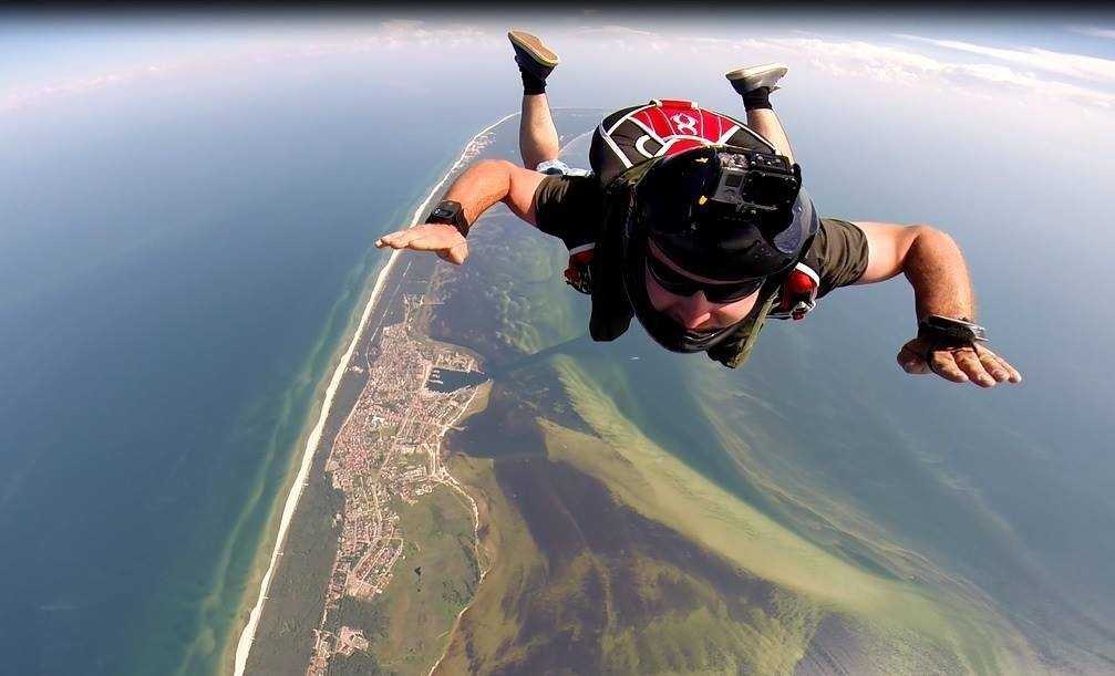 Wojciech Kielar — Sekcja spadochronowa Aeroklubu Gliwickiego